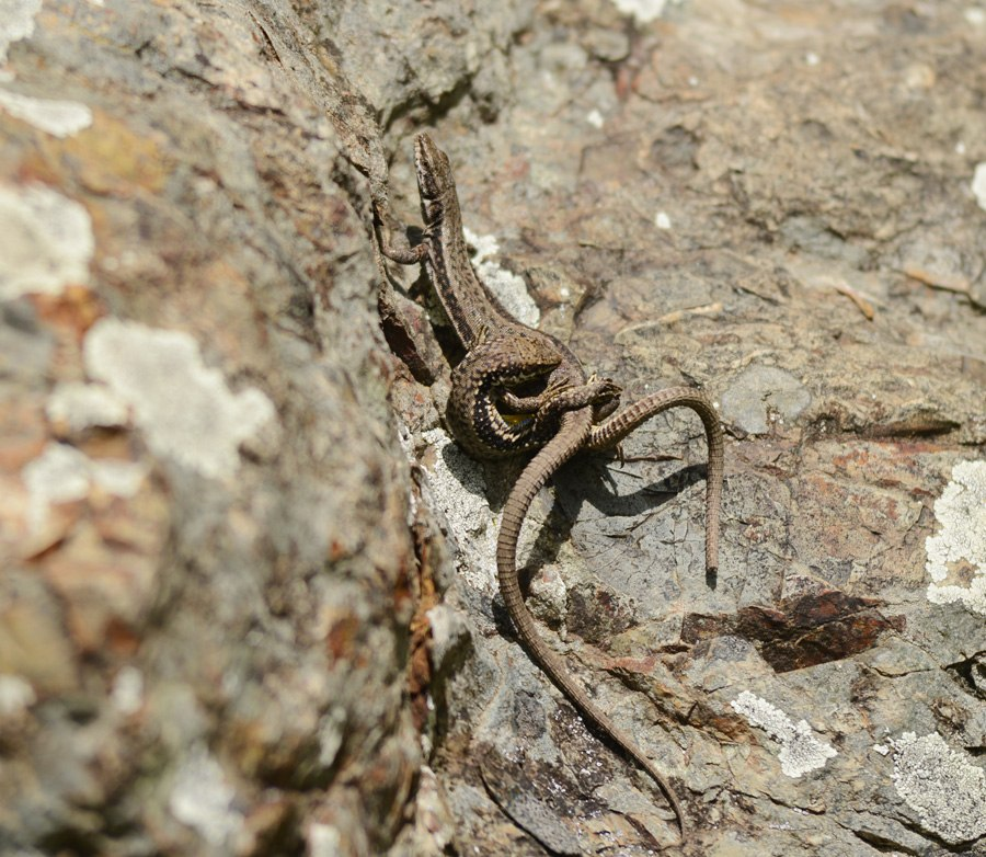 спаривание Darevskia raddei